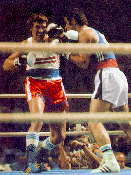 Mohammad Azarhazin vs Franz Dorfer 1976 Olympics